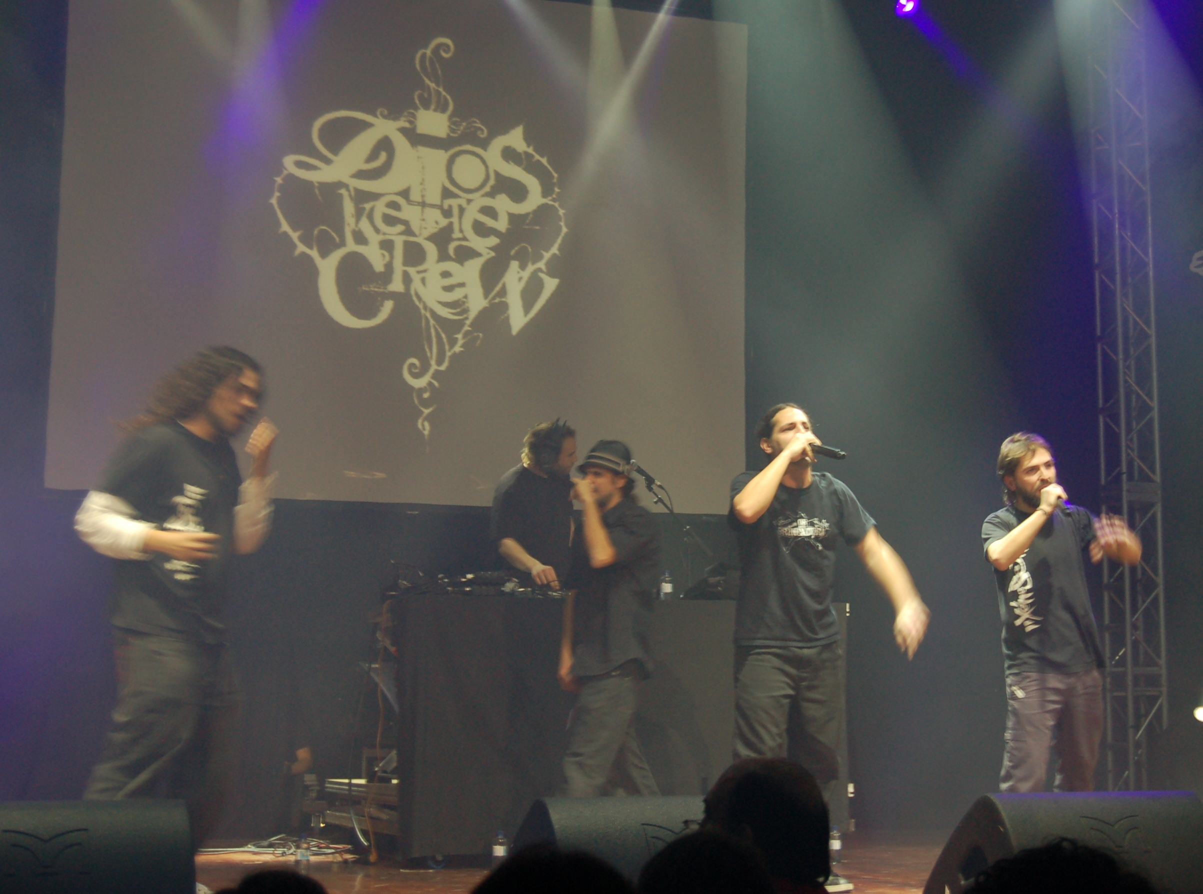 Concerto de Dios ke te crew no CulturGal 2008